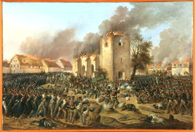 Erstürmung des Dorfes Probstheida in der Völkerschlacht bei Leipzig am 18. Oktober 1813, Gemälde von Ernst Wilhelm Straßberger (1796–1866), Öl auf Leinwand, 57 x 84 cm